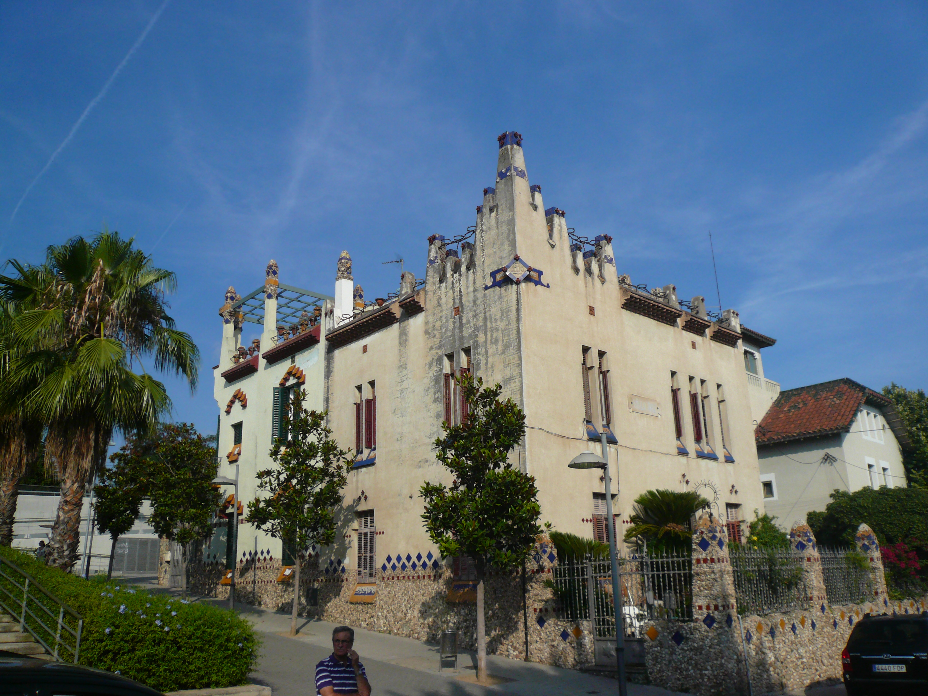 Vil·la José, Casa Anzizu. Pg. Canalies, 10 (Sant Joan Despí). Object location41° 22′ 05.1″ N, 2° 03′ 36.04″ E